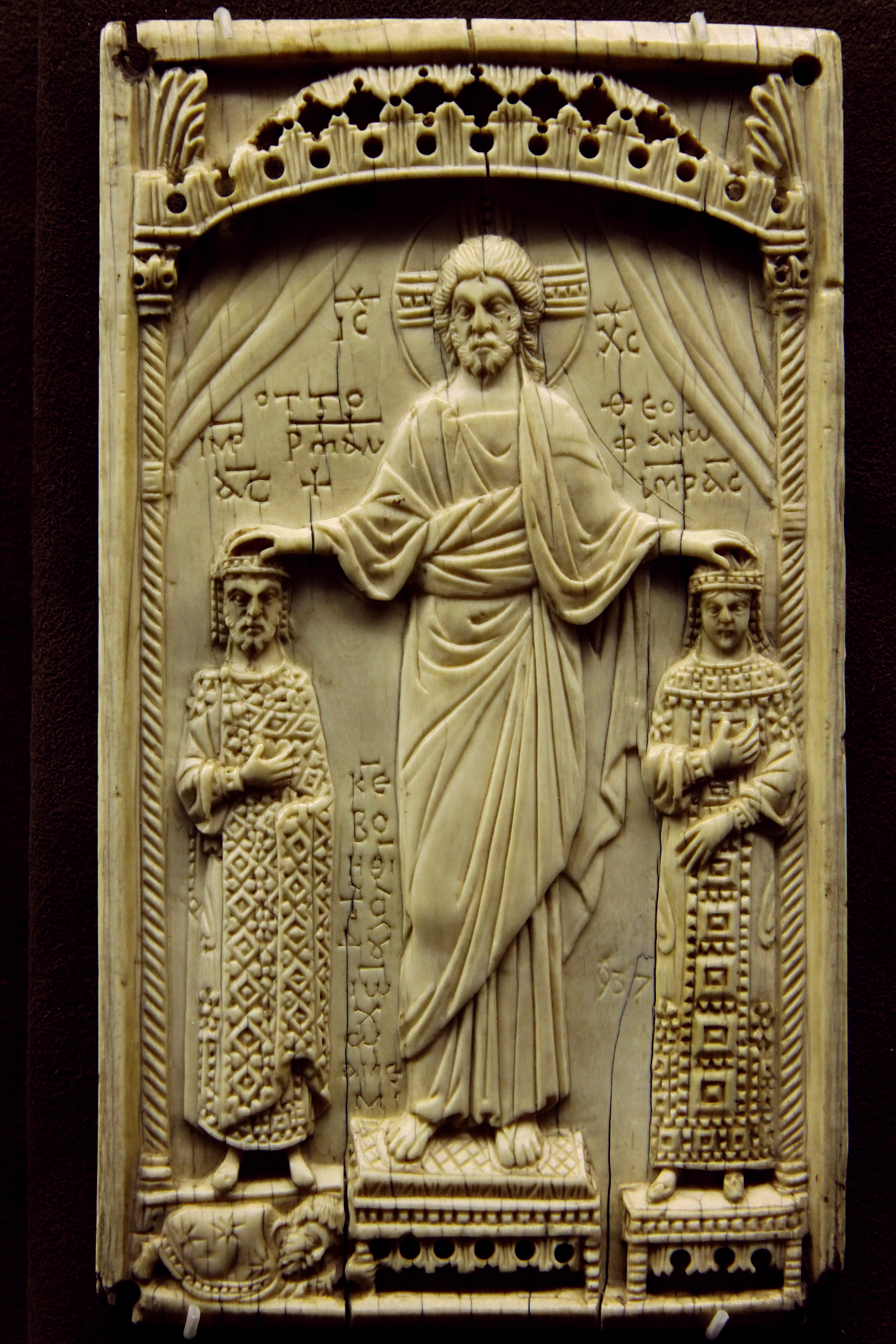 Plaque de reliure en ivoire représentant le couronnement d'Otton II et Théophano. Origine : Empire germanique, peut-être réalisé par un artiste byzantin, vers 982-983. Classement : 392